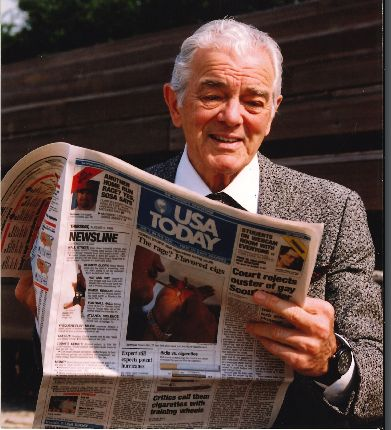 From inner Harbor Baltimore 1999